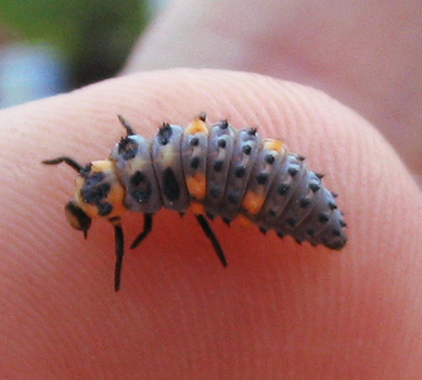 Beschreibung: Marienkäferlarve (Coccinellidae) Fotograf: Darkone, 16. Juli 2005